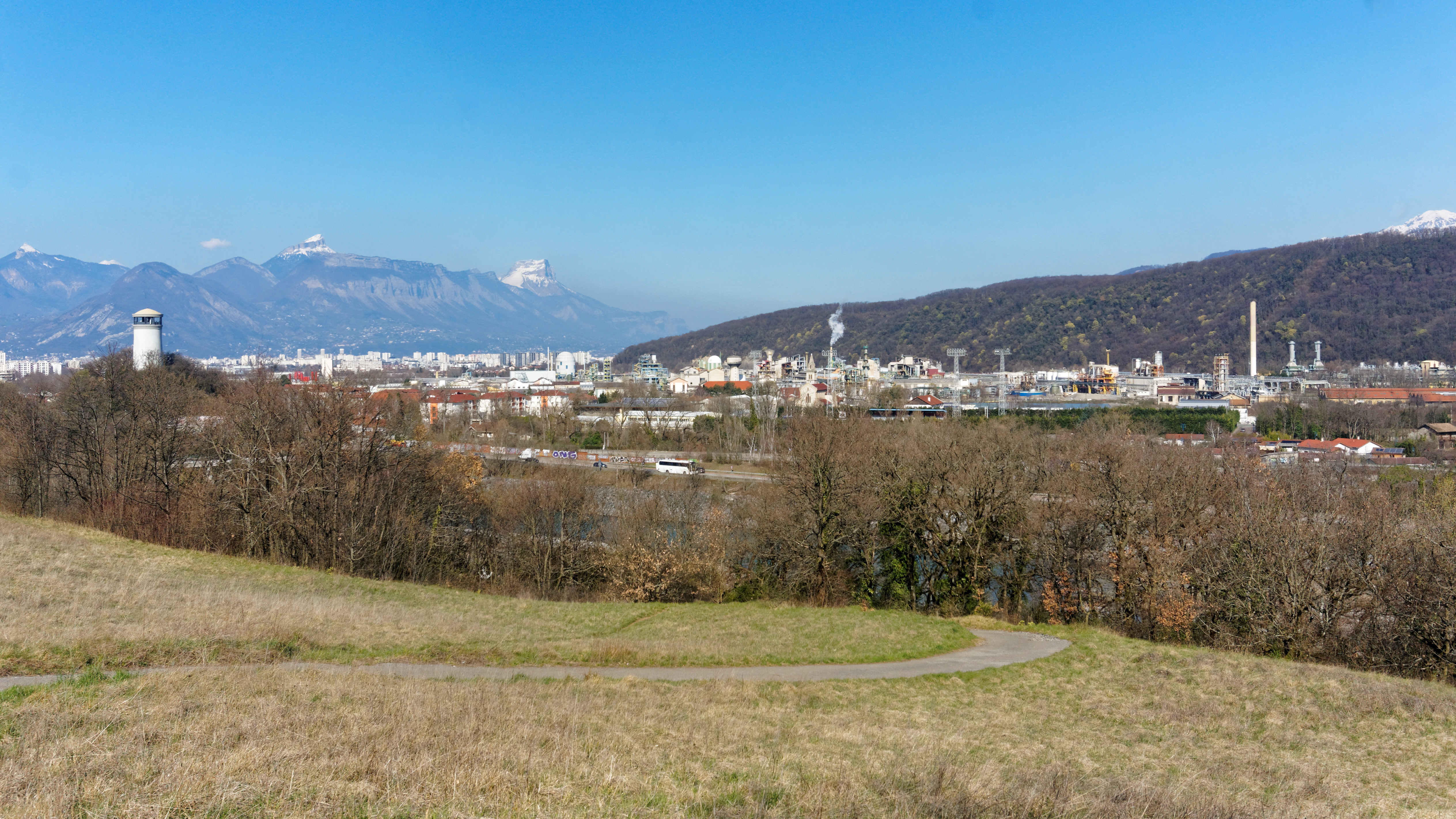 Plate-forme chimique de Pont-de-Claix vue de la colline du Rochefort à Claix